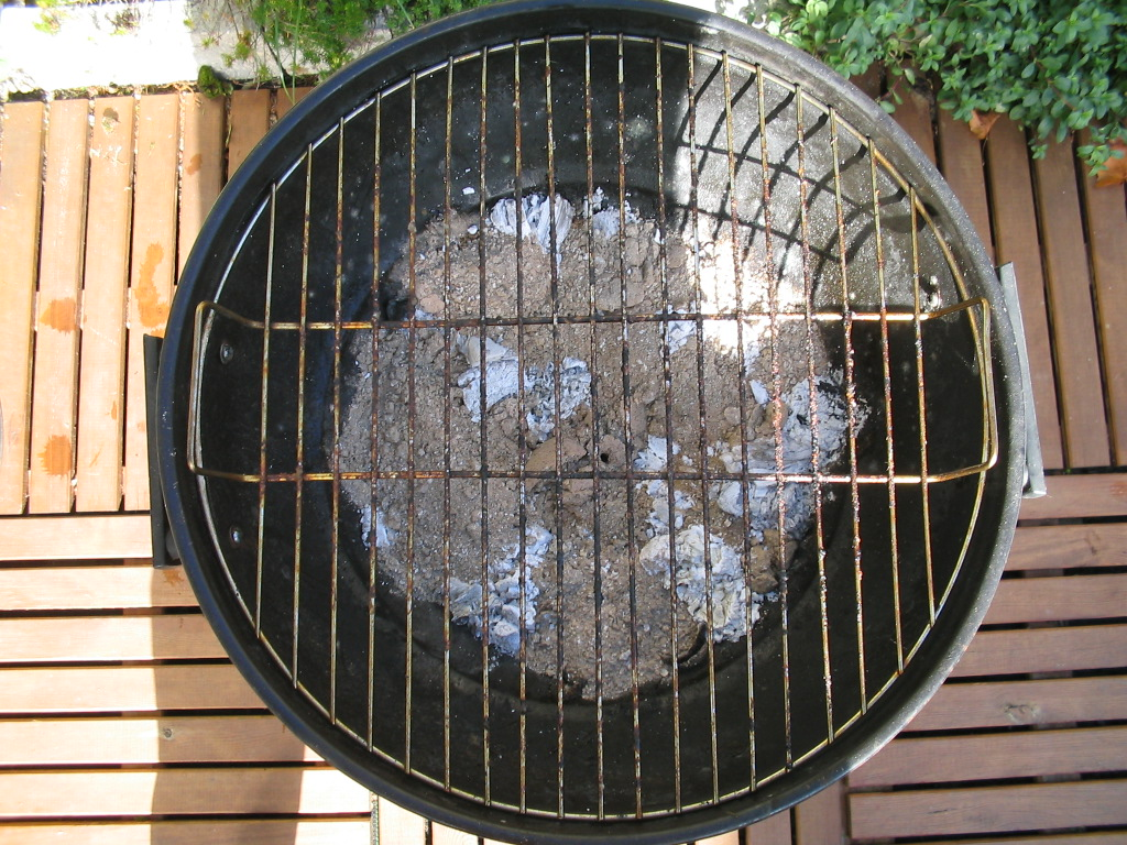 rooster van barbeque